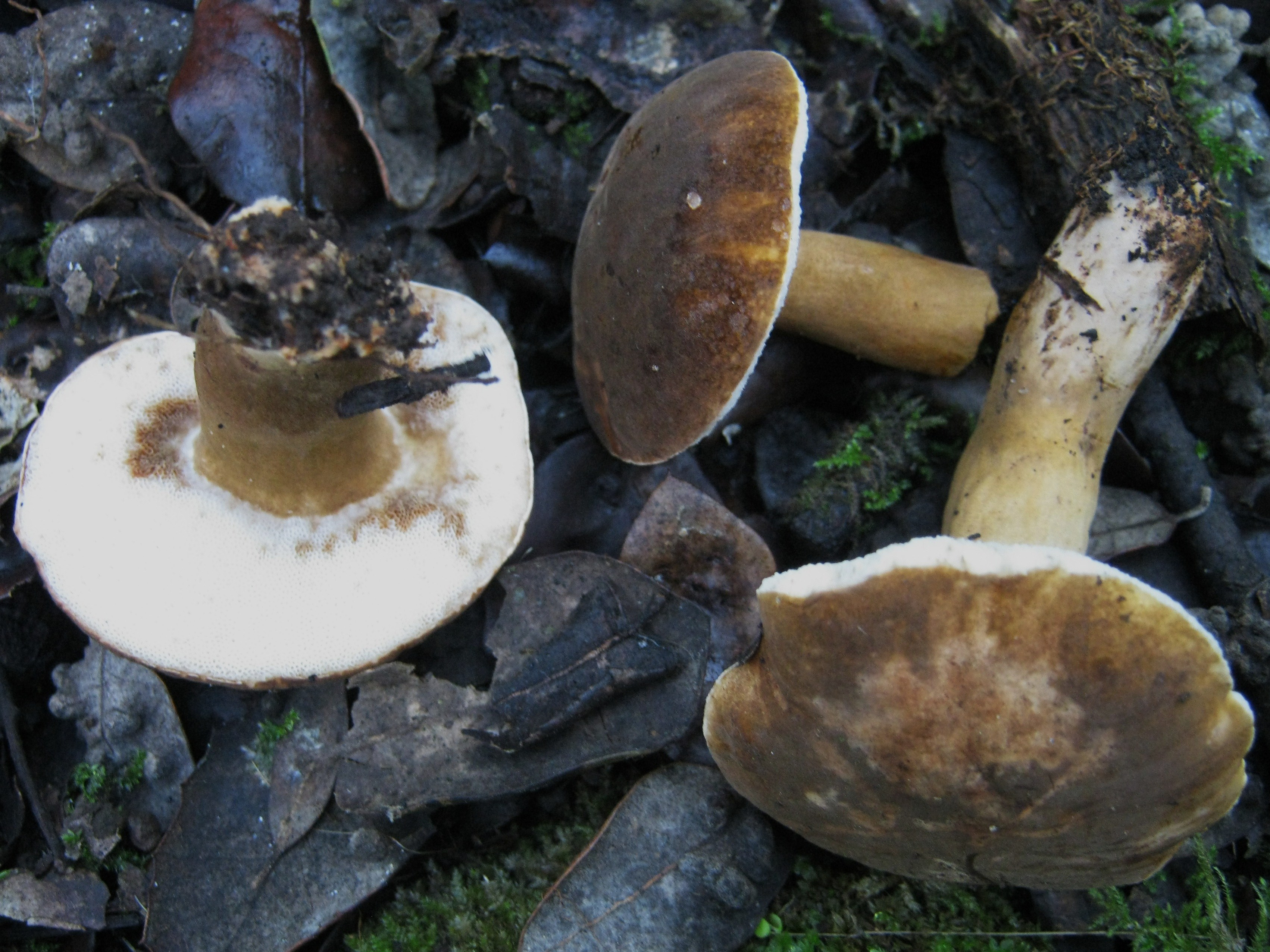 Gyroporus castaneus (Bull.:Fr.) Quélet